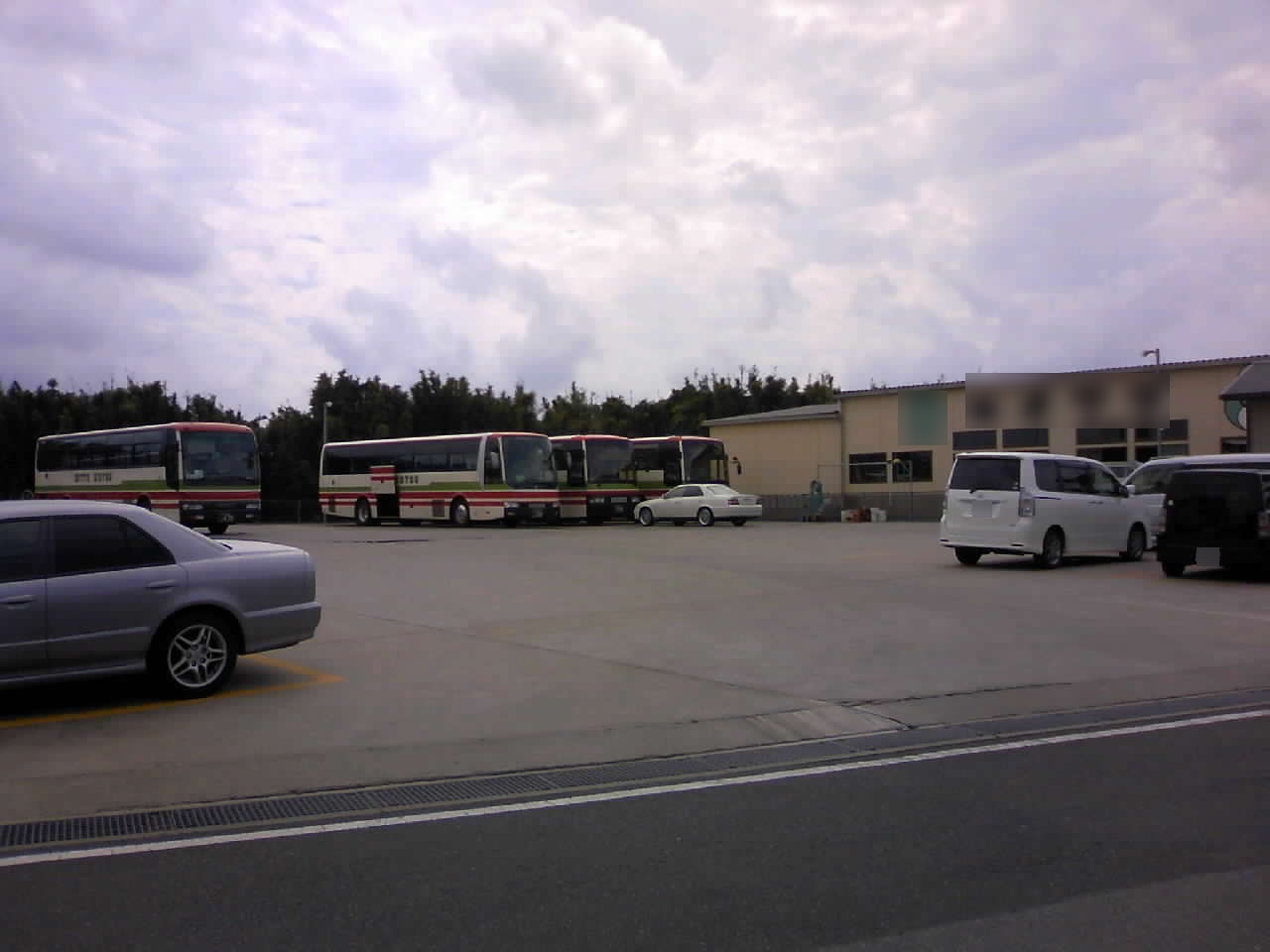 日東交通館山運輸営業所（正木車庫）